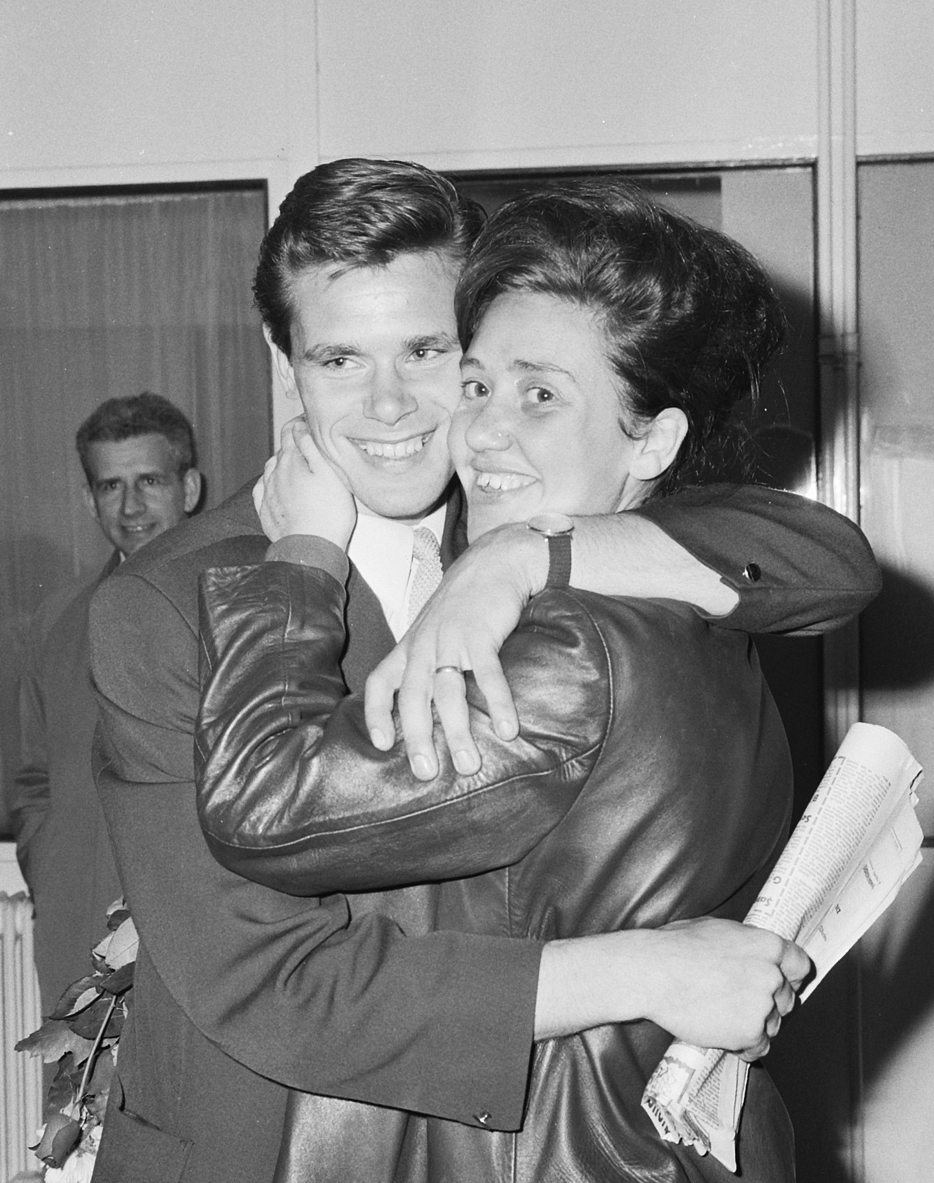 DWS terug uit Turkije, Jongbloed begroet door vrouw